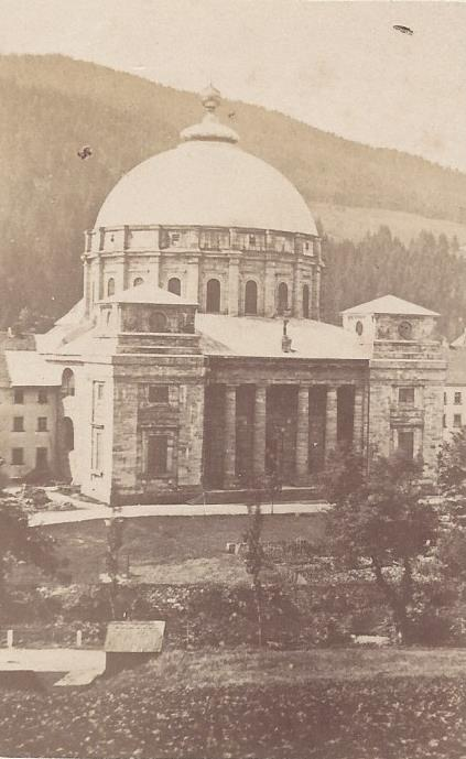 Domansicht in St. Blasien. CDV von 1870 mit Ansicht der Kuppel vor dem Brand von 1874. CDV mit rückseitigem Stempel: B. Weber, Handlung en gros & detail, St. Blasien.